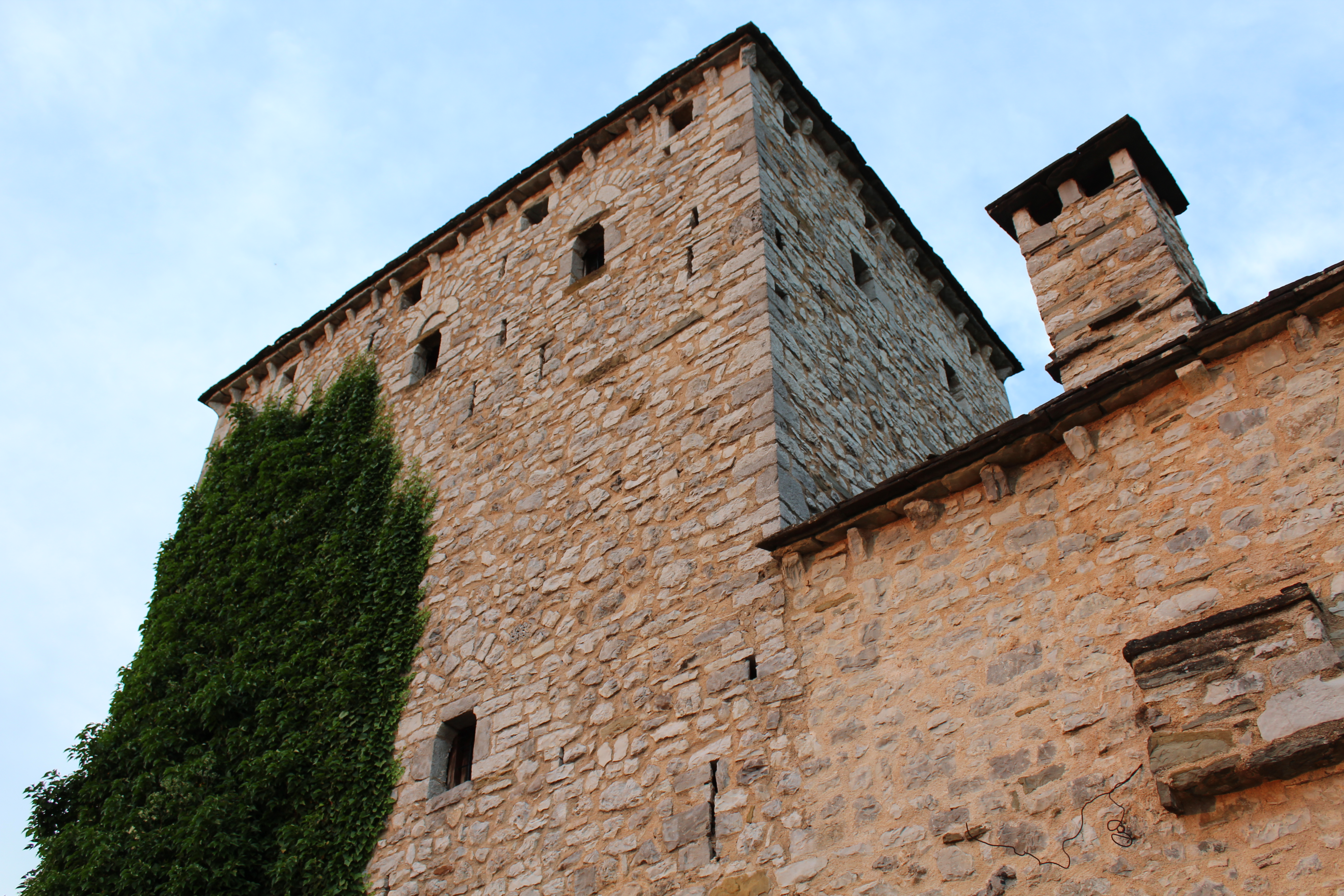 Οικιστικό συγκρότημα Χάμκως«Οικιστικό συγκρότημα Χάμκως»